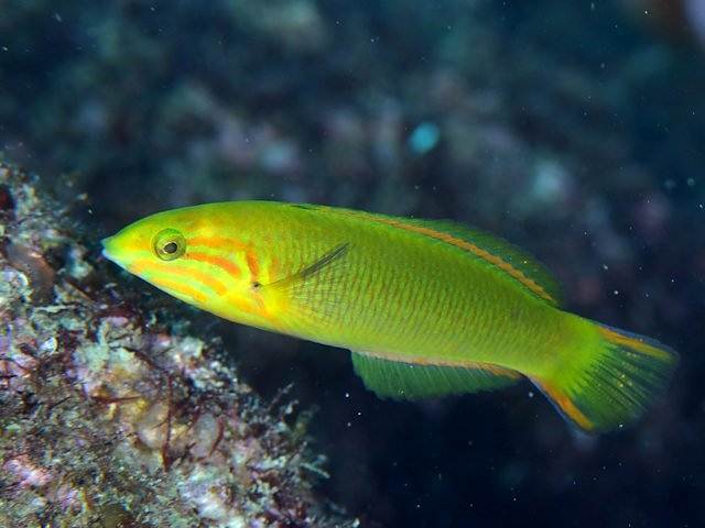 ヤマブキベラ Thalassoma lutescens